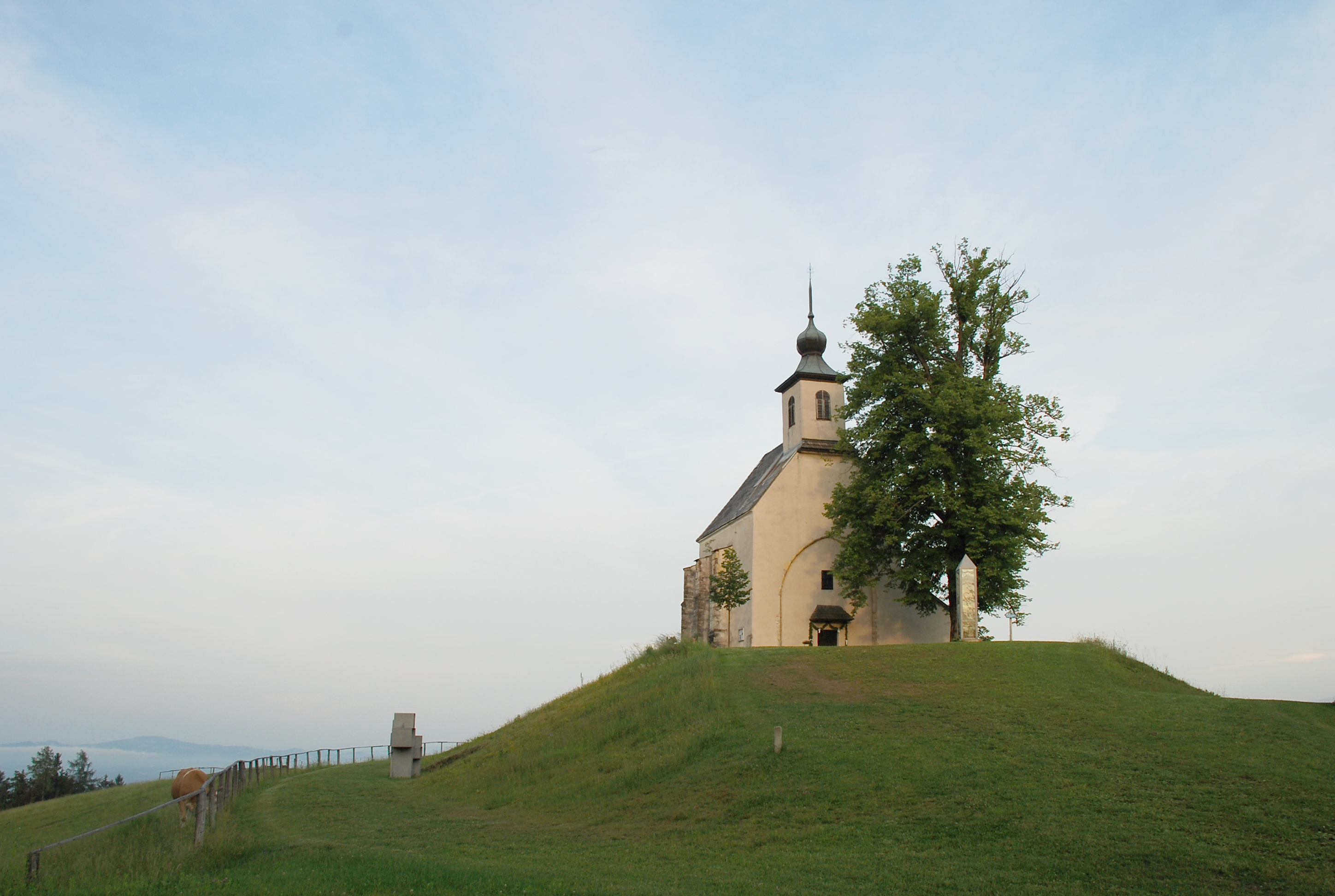 Hollenegg, Steiermark, Österreich: St. Wolfgang-Kirche